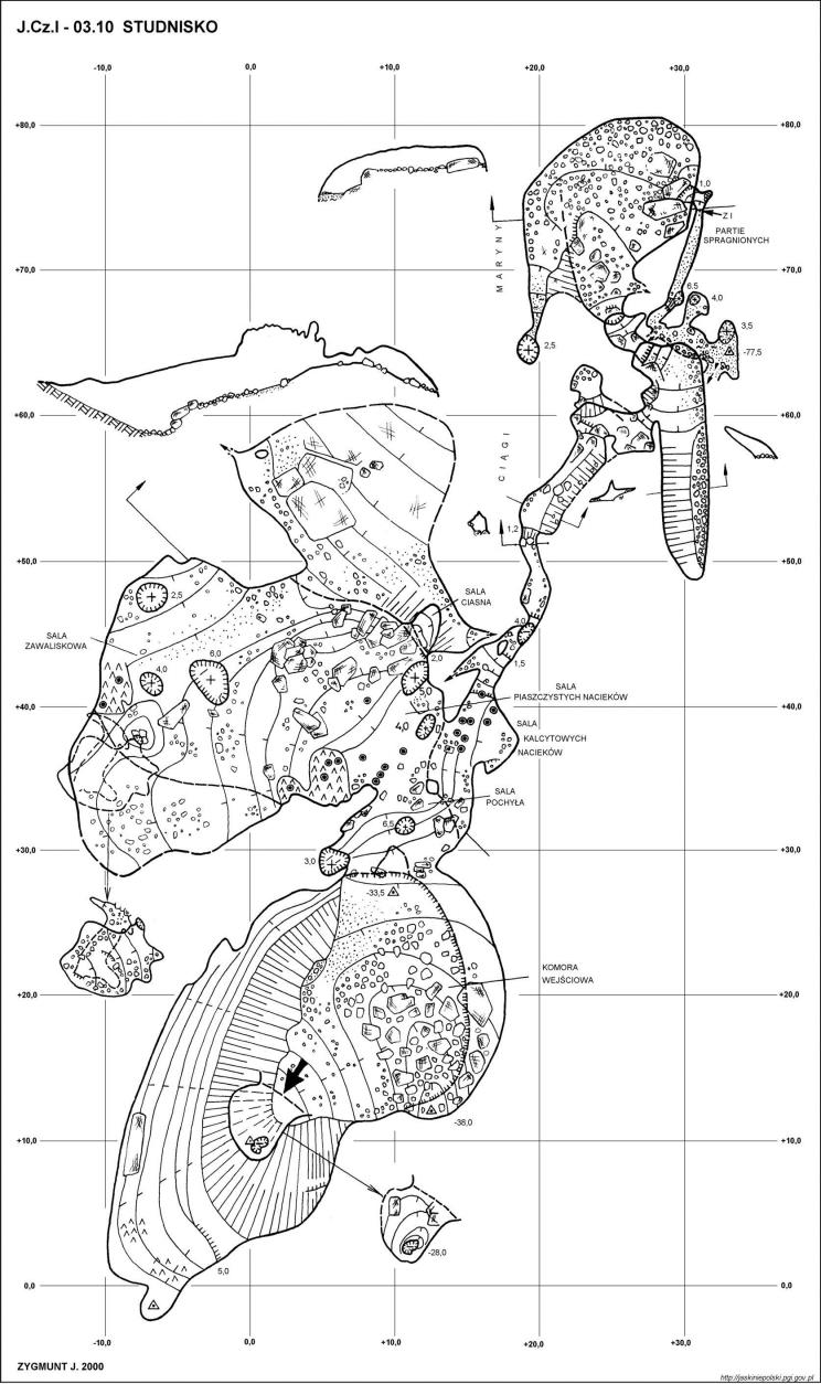 Jaskinia Studnisko - plan